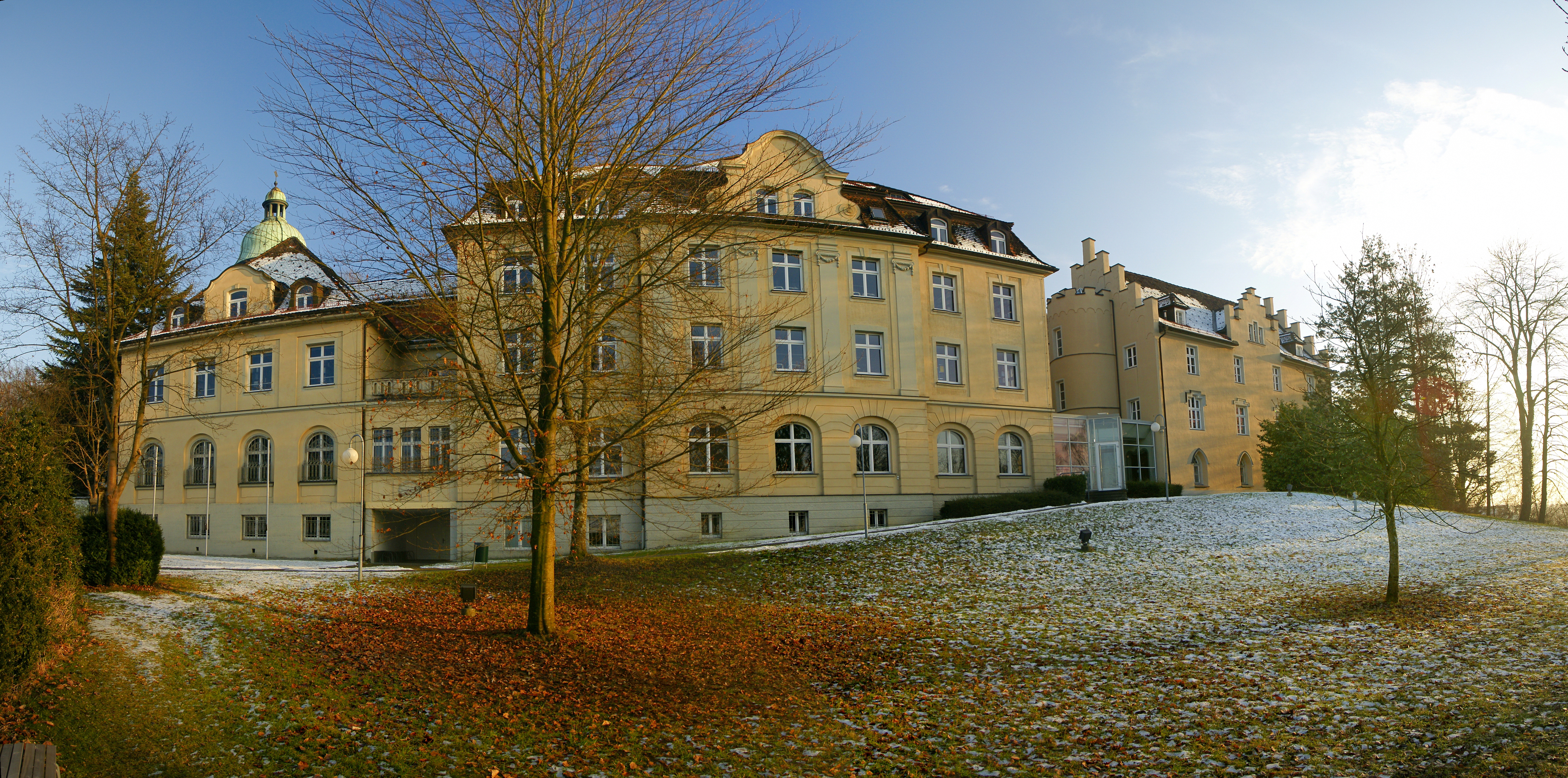 Panorama aus 7 Bilder Vorarlberger Landesbibliothek in Bregenz